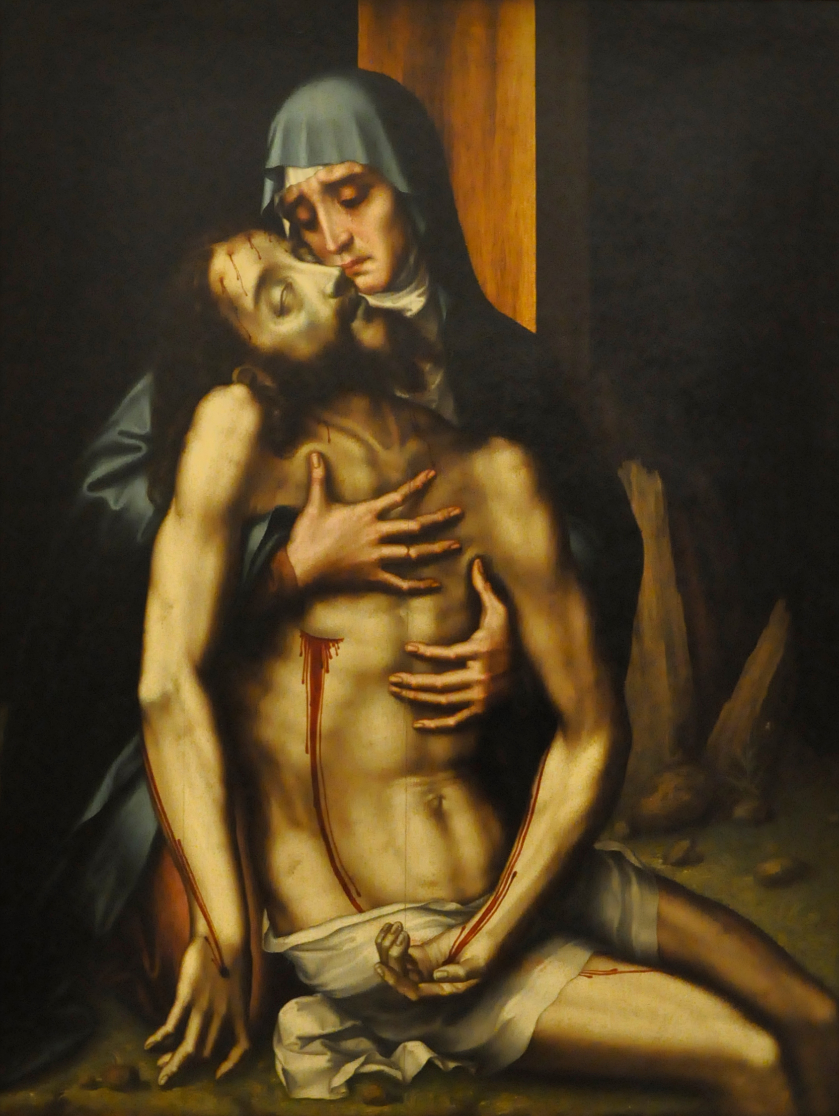 La obra representa a Jesucristo muerto y en los brazos de su madre, la Virgen María, que se lamenta de la muerte de su hijo.